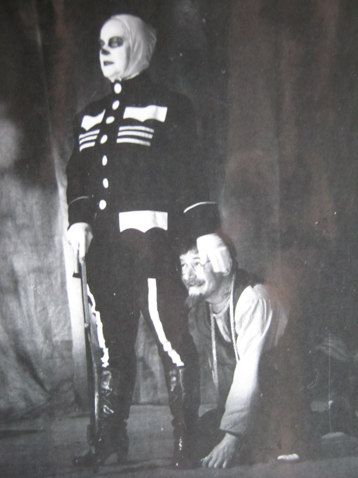 Спектакль Санкт-Петербургского драматического театра «Патриот» РОСТО «Сказ о солдате и Бессмертном Кощее» Татьяна Пилецкая в роли Смерти, Валерий Горбунов в роли Бессмертного Кощея, режиссёр-постановщик Егоров Г.С.